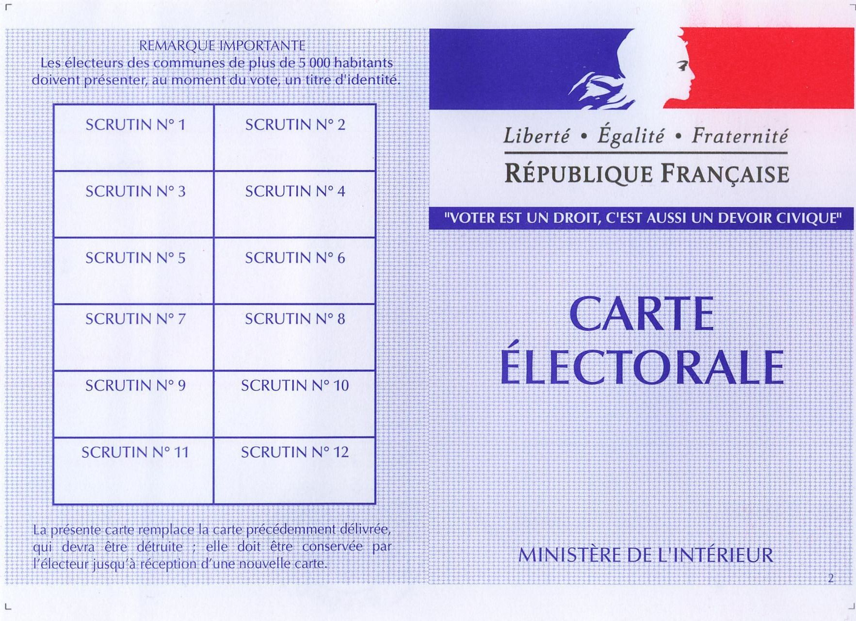 Carte électorale de France 2007